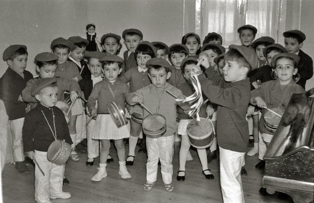 Título original: Tamborrada infantil en San Sebastián (8/9) Localización: San Sebastián (Guipúzcoa)